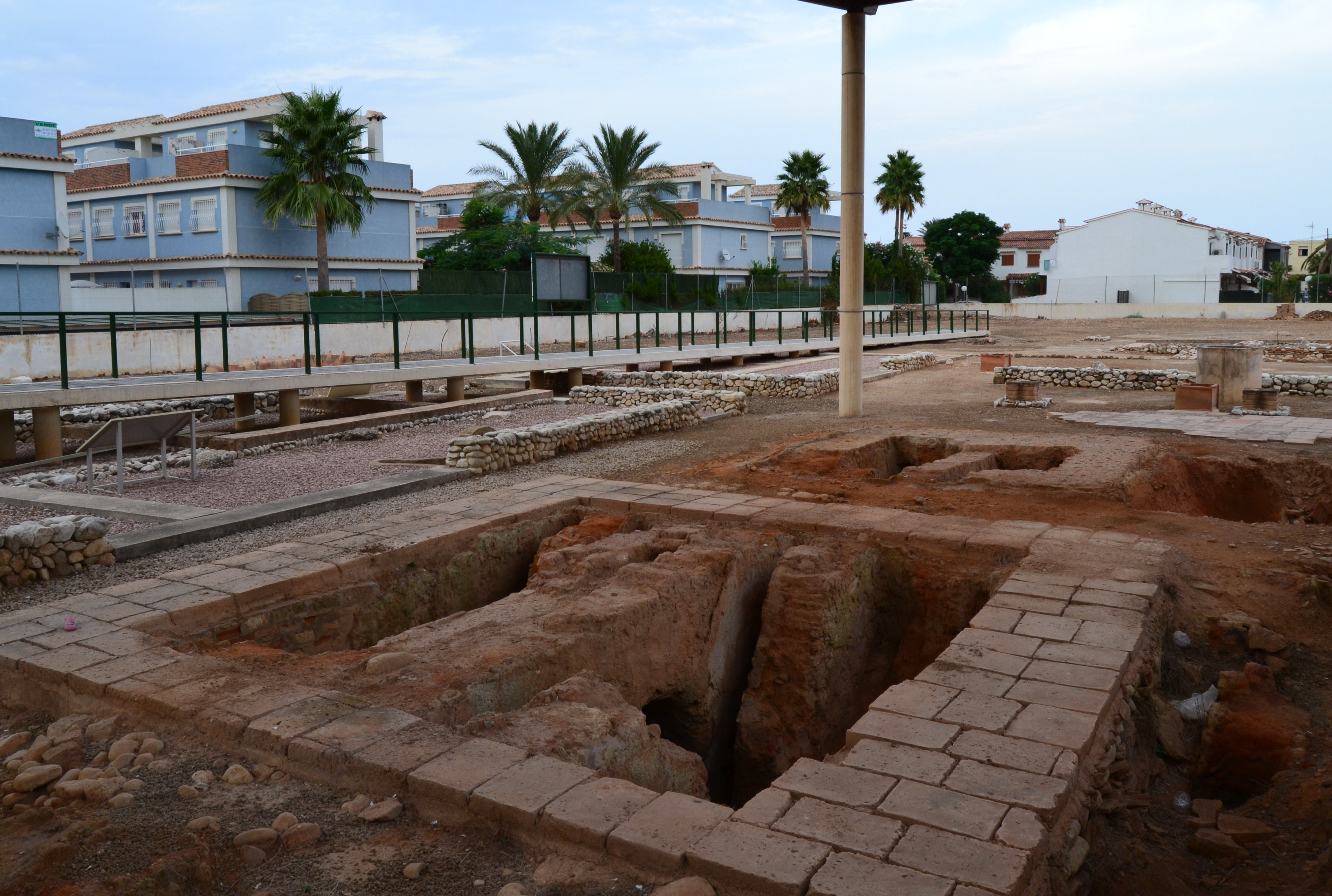 Terrisseria de la vil·la romana de l'Almadrava, els Poblets.